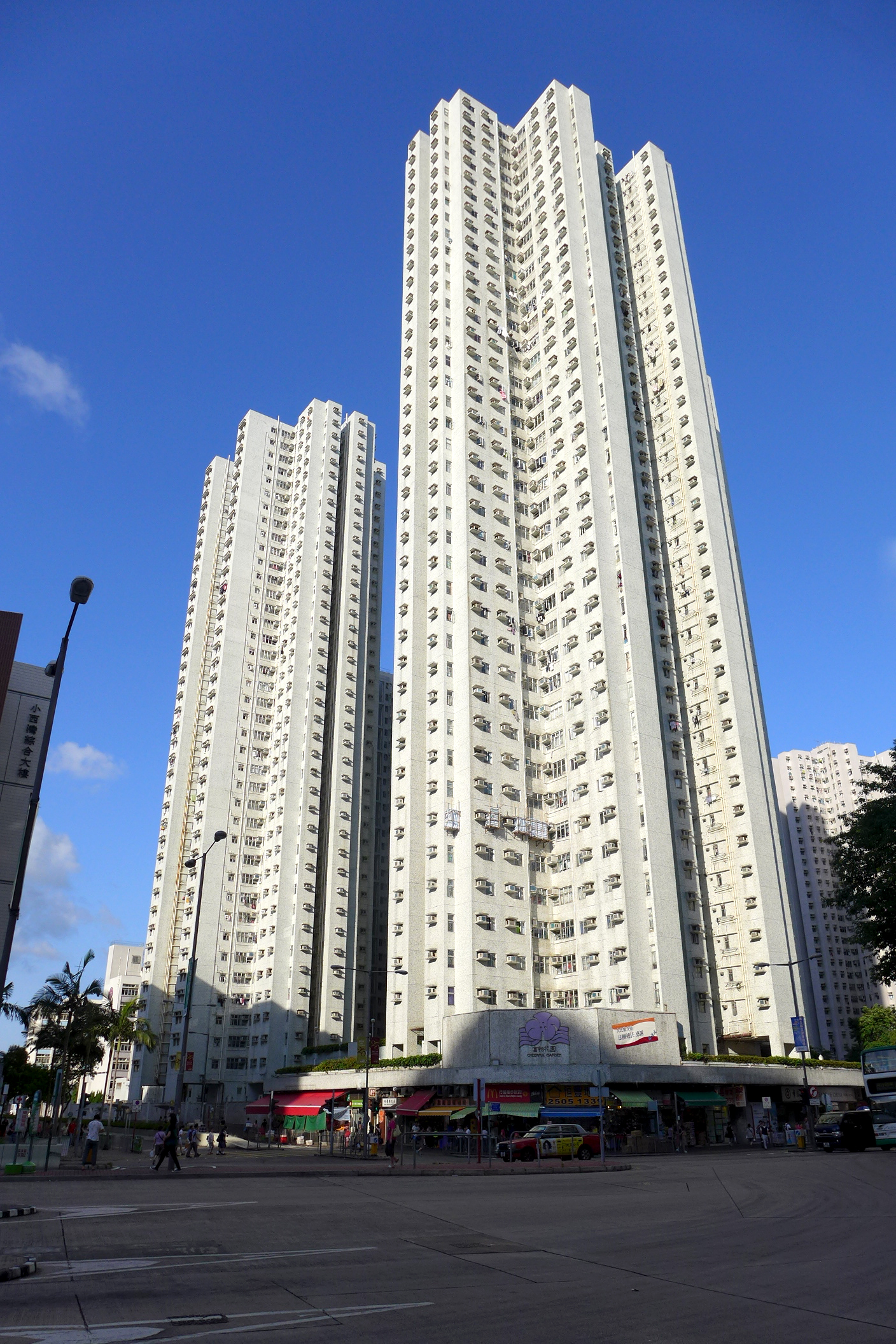 Cheerful Garden